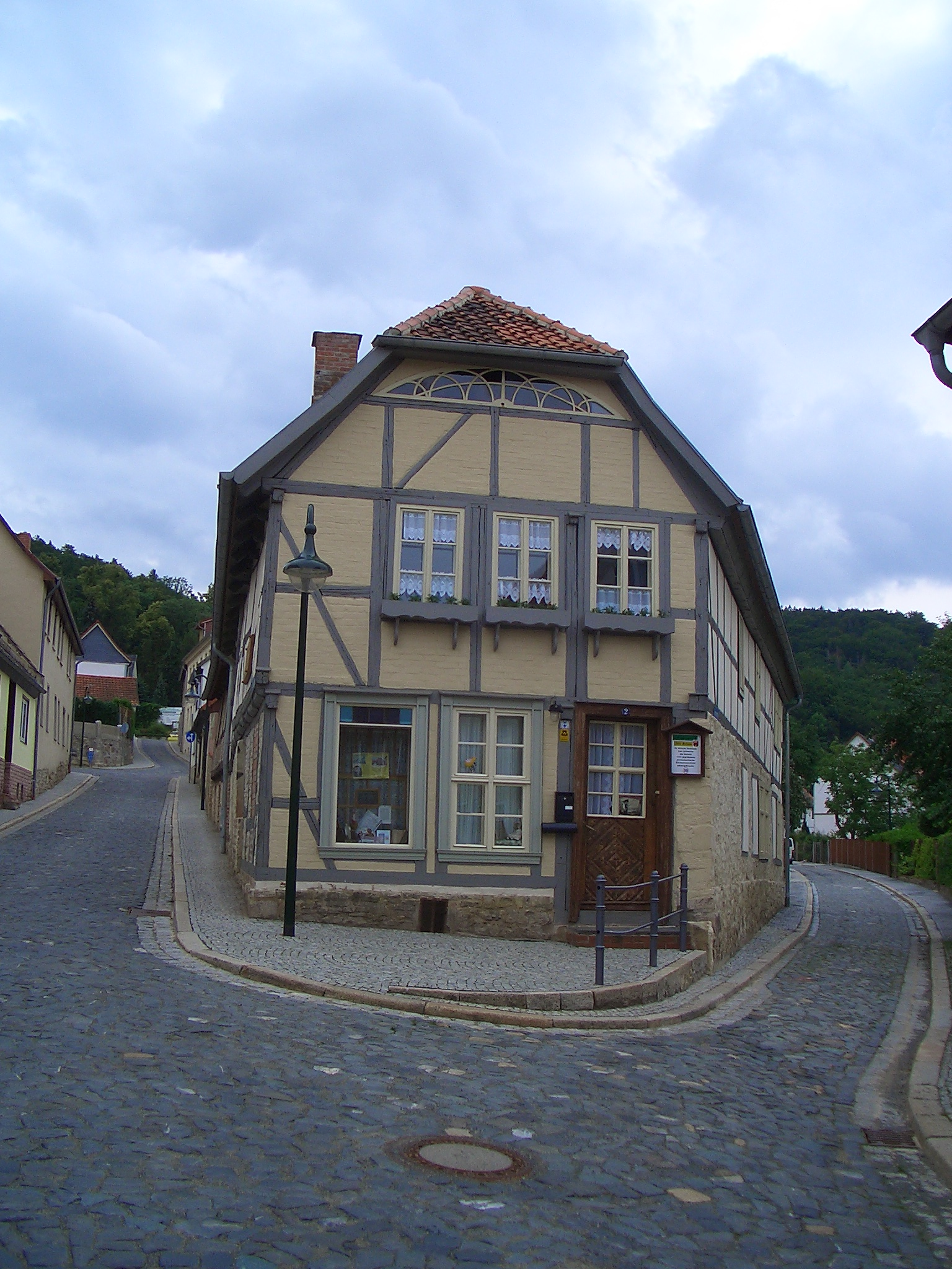 Erste evangelische Schule - Gernrode